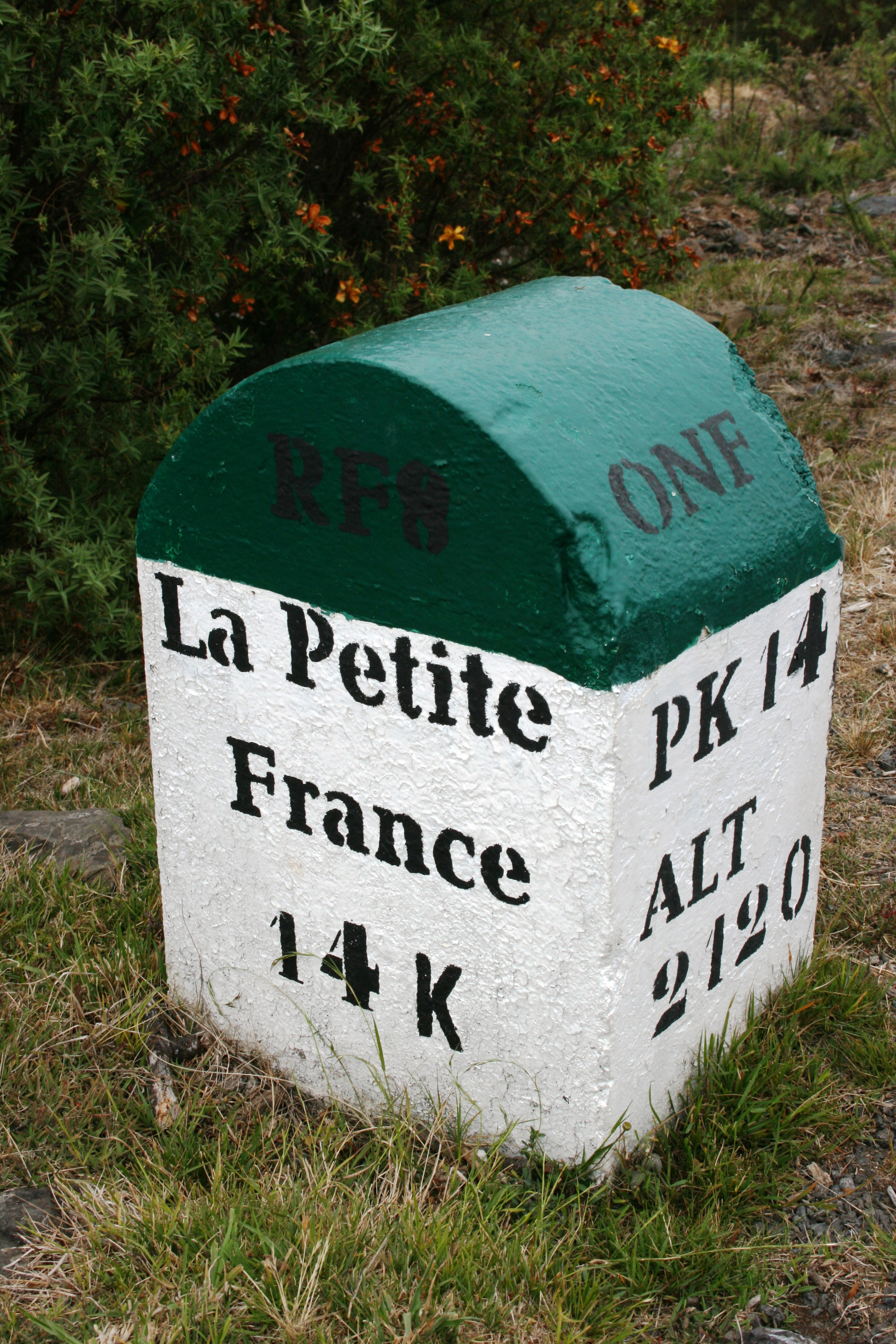 Borne kilométrique de la route forestière du Maïdo indiquant la Petite France, à Saint-Paul de La Réunion, sous un brouillard habituel.